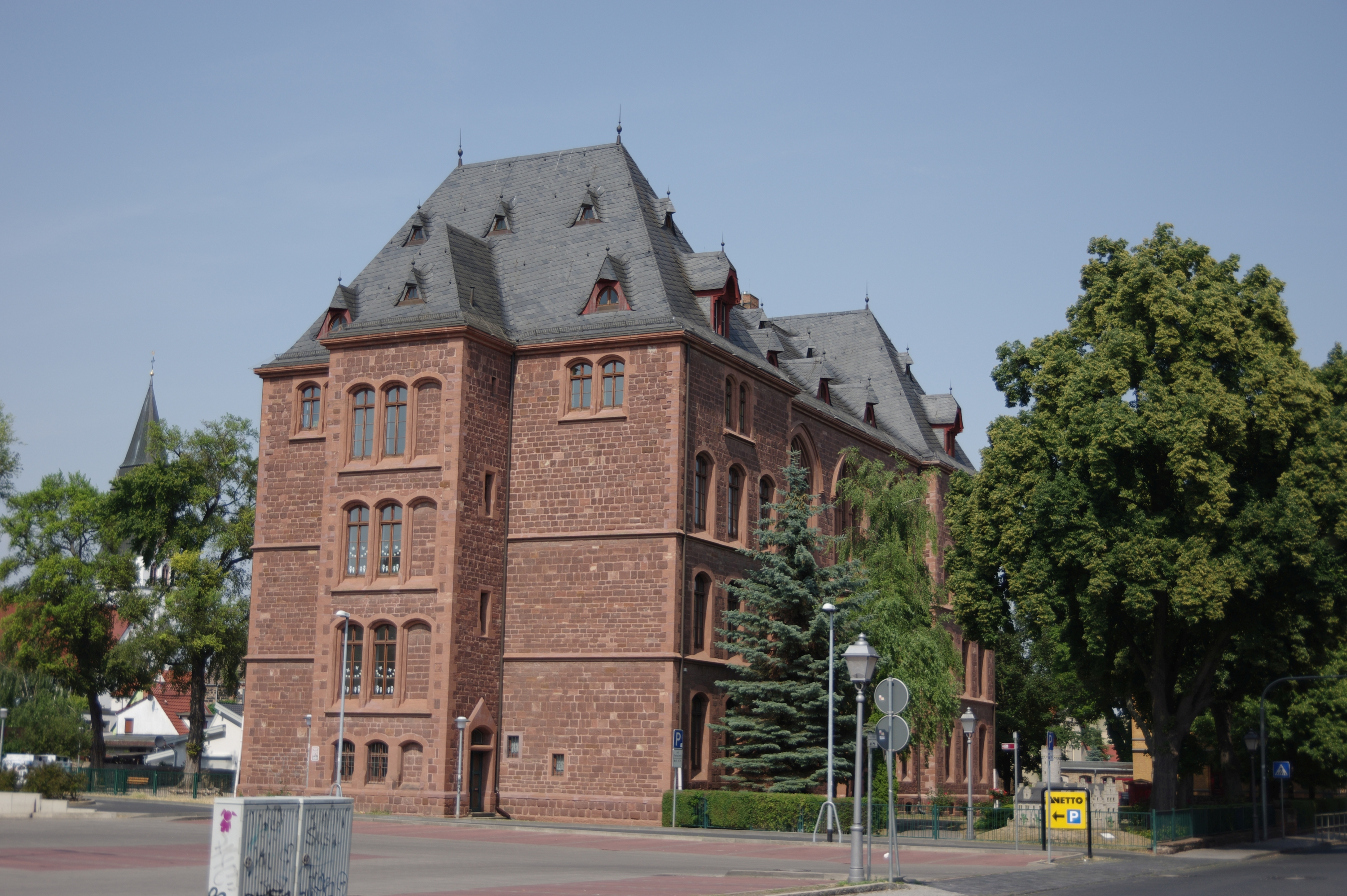 Lutherstadt Eisleben. Das Haus am Markt (Straße und Nummer im Namen der Datei) steht unter Denkmalschutz.